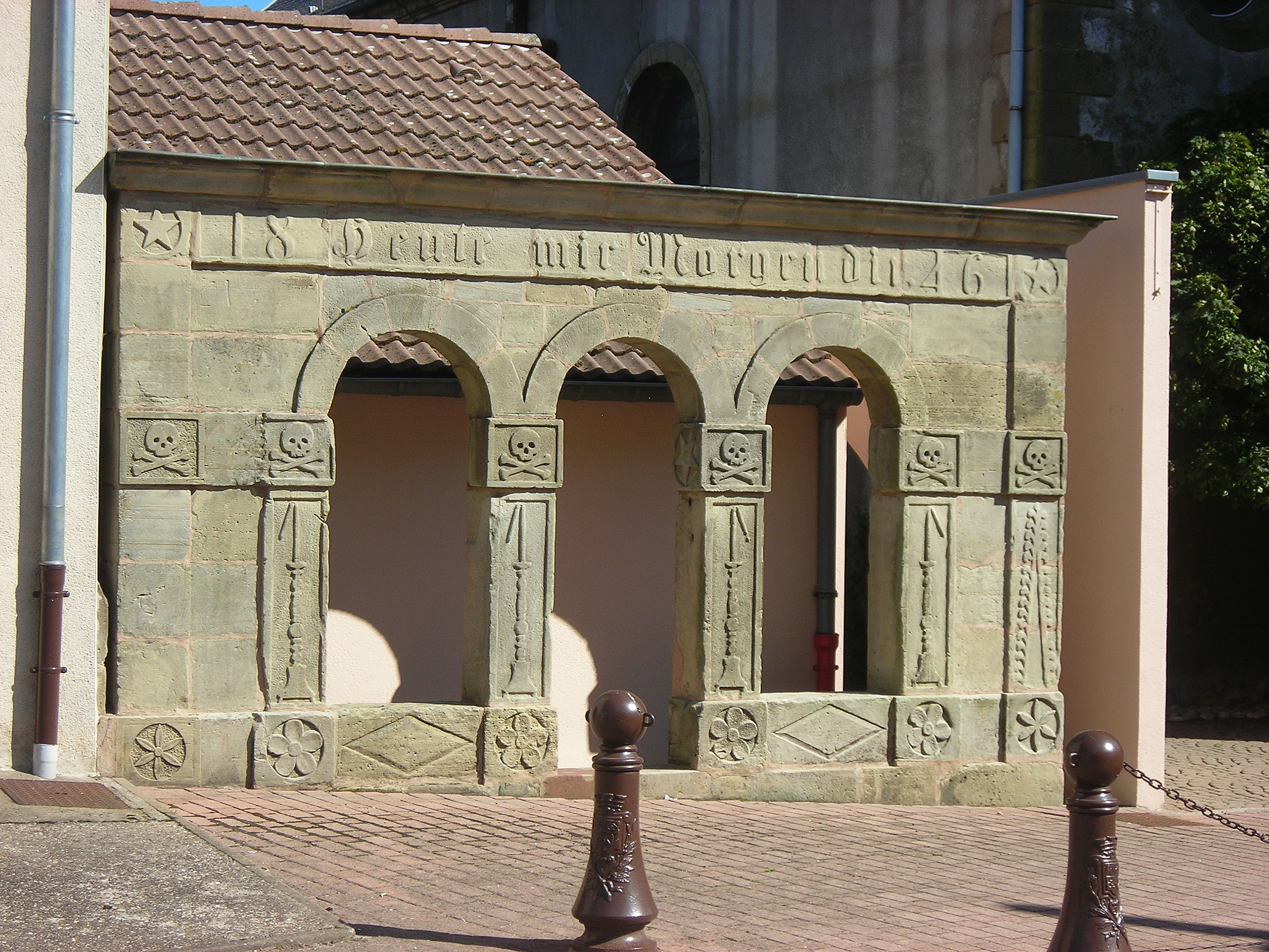 Façade de l'ancien ossuaire de Boucheporn (Moselle, France)